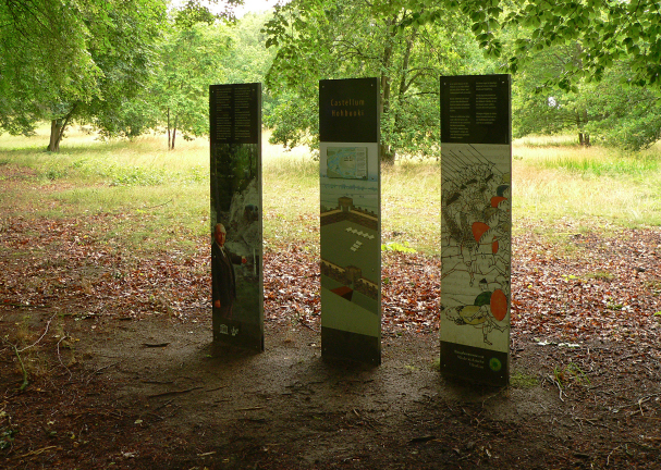 Infotafeln im Innenraum der Vietzer Schanze